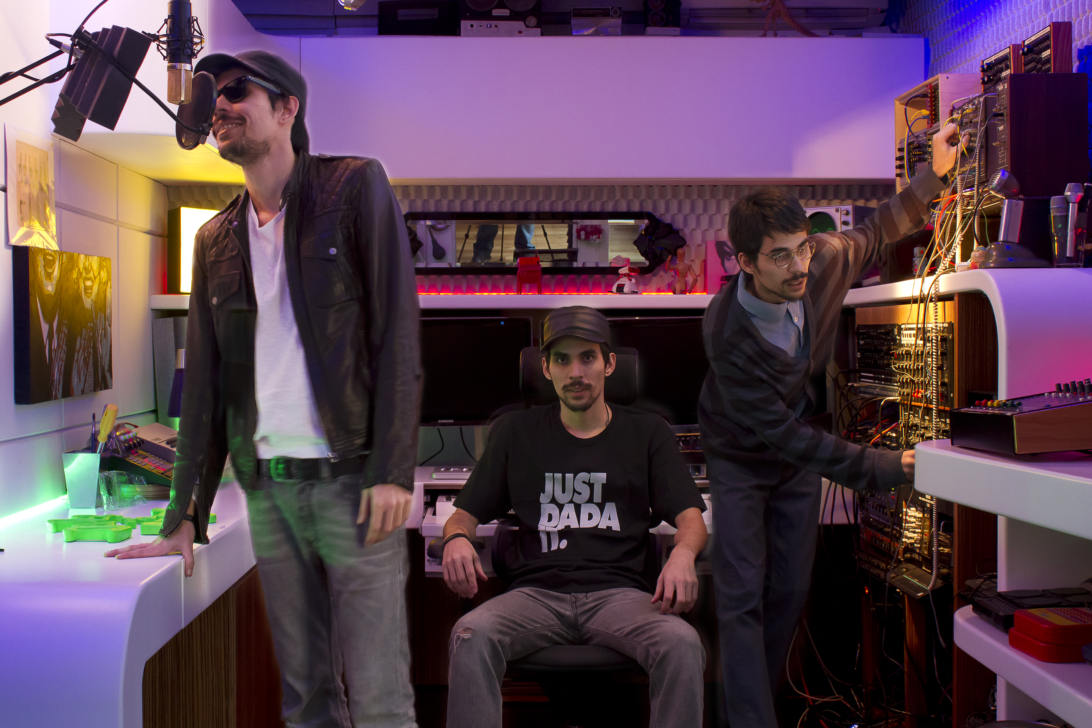 DaDa Attack em seu estúdio musical